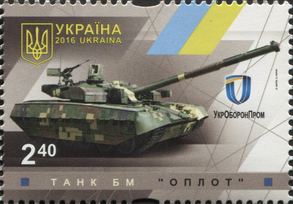 Марка України «Танк БМ „Оплот“»